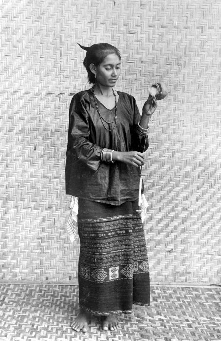 Repronegatief. Kisarse vrouw met spinstaafjes, Timor